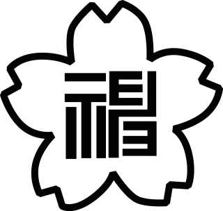 神足小学校の公式サイトから